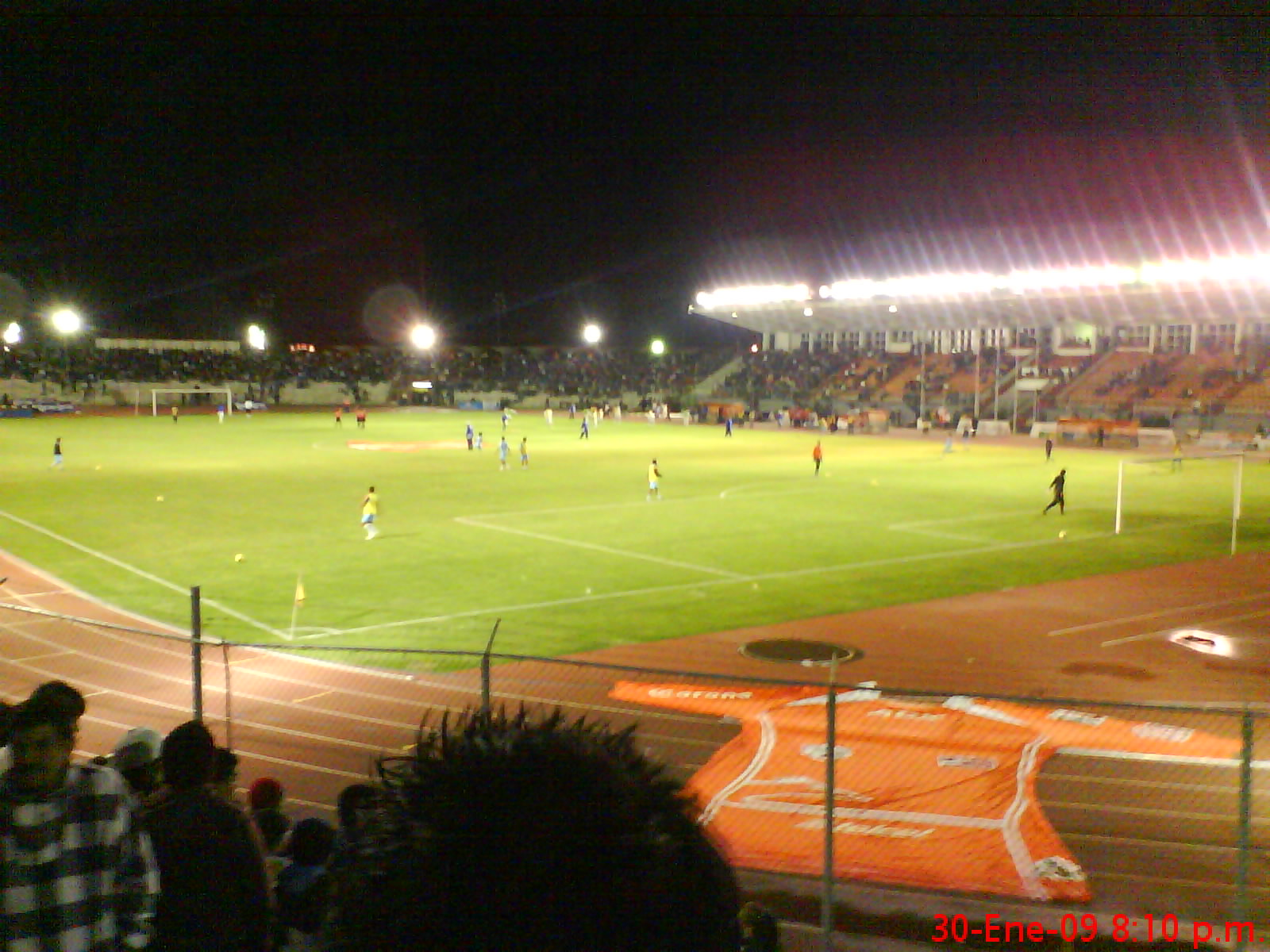 Foto de la playera del equipo